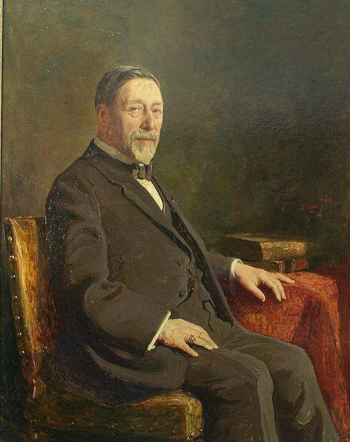 painting, Nienhuys, J. (1836-1928)